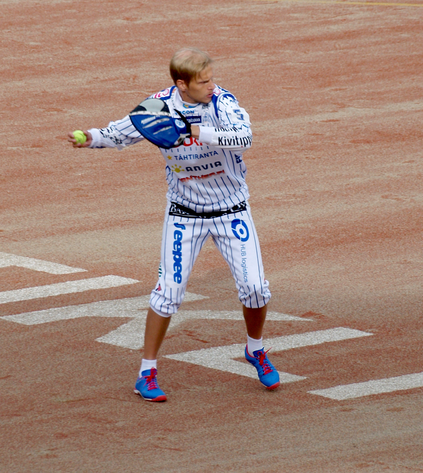 Vimpelin Veto - Koskenkorvan Urheilijat pesäpallo-ottelu 1.8.2014. Kuvassa Vimpelin Vedon lukkari Hannu Huuskonen.